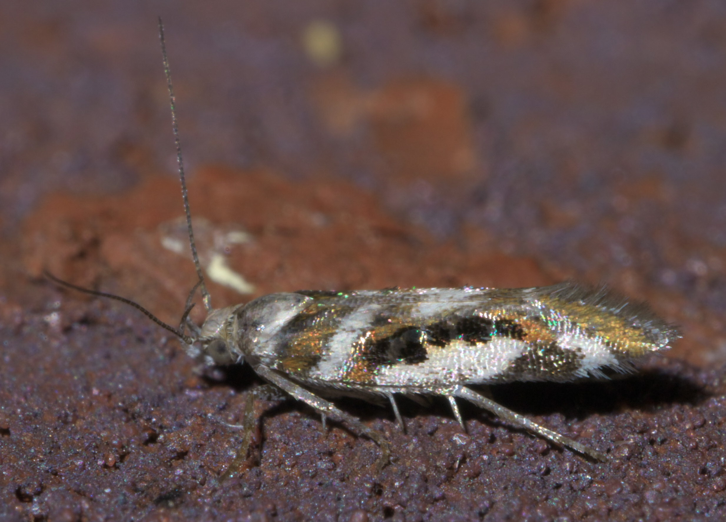 Aristotelia elegantella, elegant aristotelia moth, Size: 5.9 mm, ID Confidence: 88